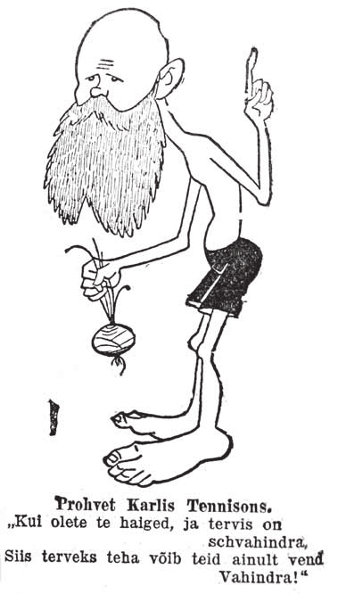 Vahindra